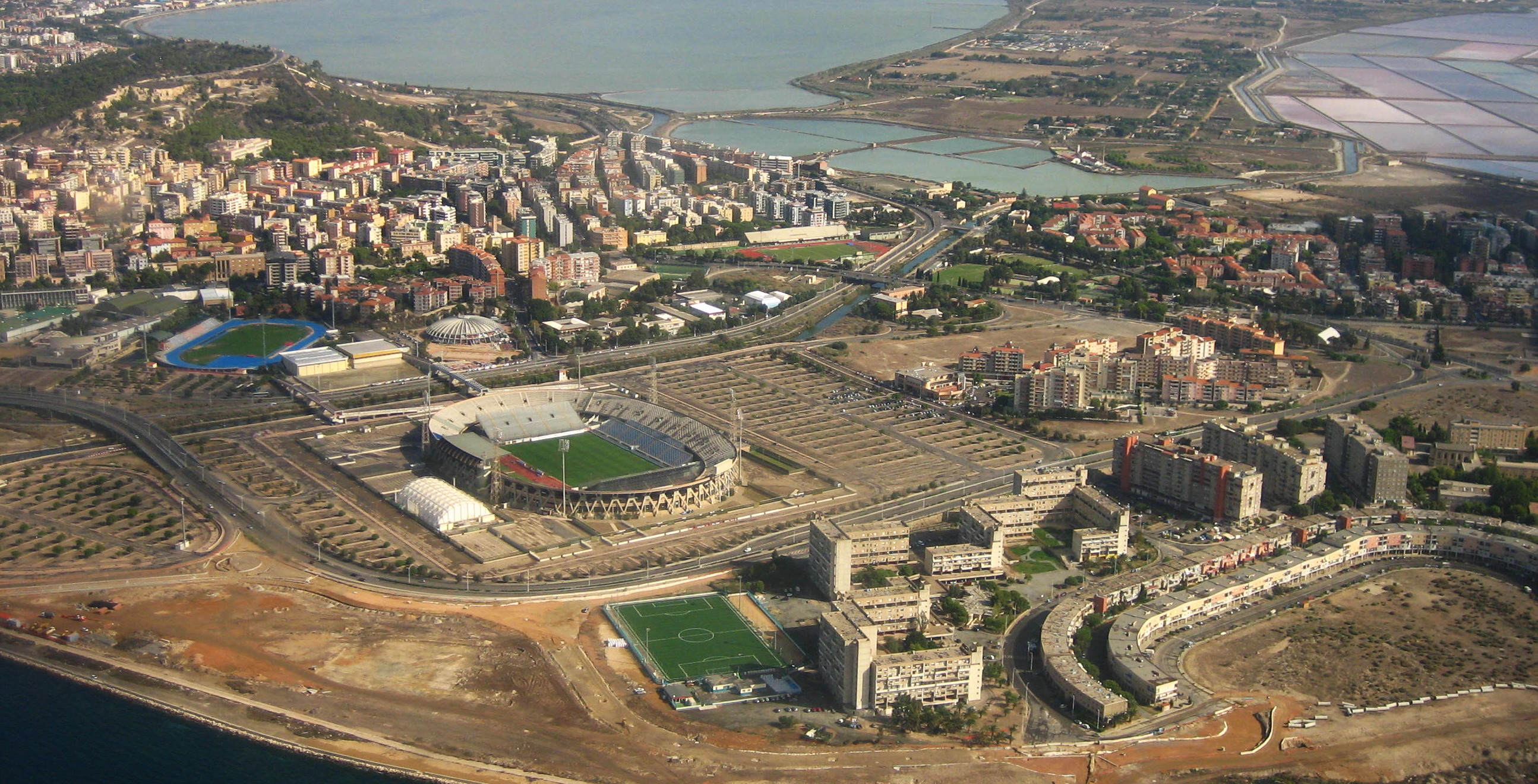 Quartiere Sant'Elia